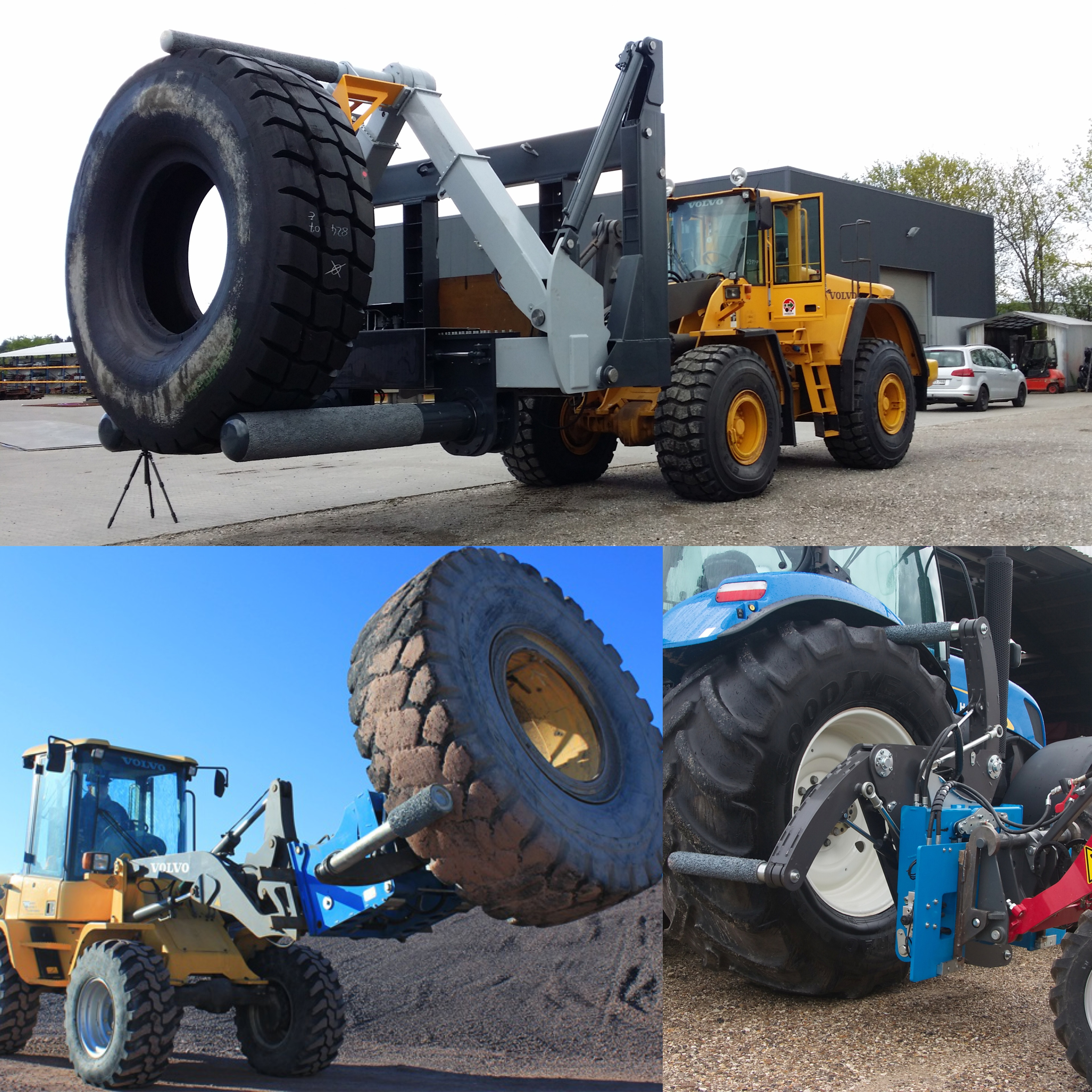 In this picture you may see difference between Tire Manipulator for mining and agriculture.